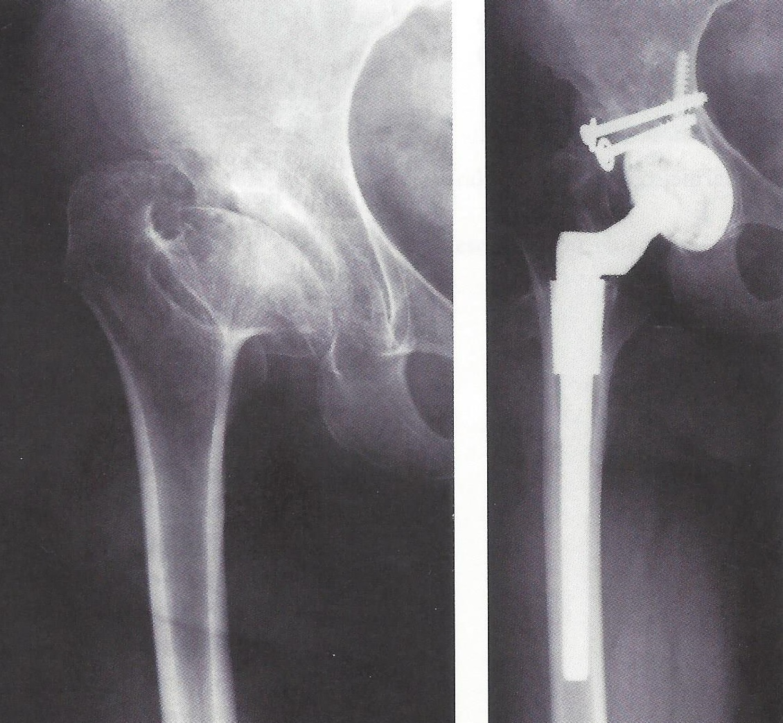 Proximaler Femurdefekt bei einer 57-jährigen Frau. Versorgung mit Pfannendachplastik aus dem Femurkopf und zementfreie Hüftendoprothese mit modularem S-ROM-Schaft. Gutes Offset durch lateralisierten Prothesenhals. Weitgehender Ausgleich der Beinlänge.